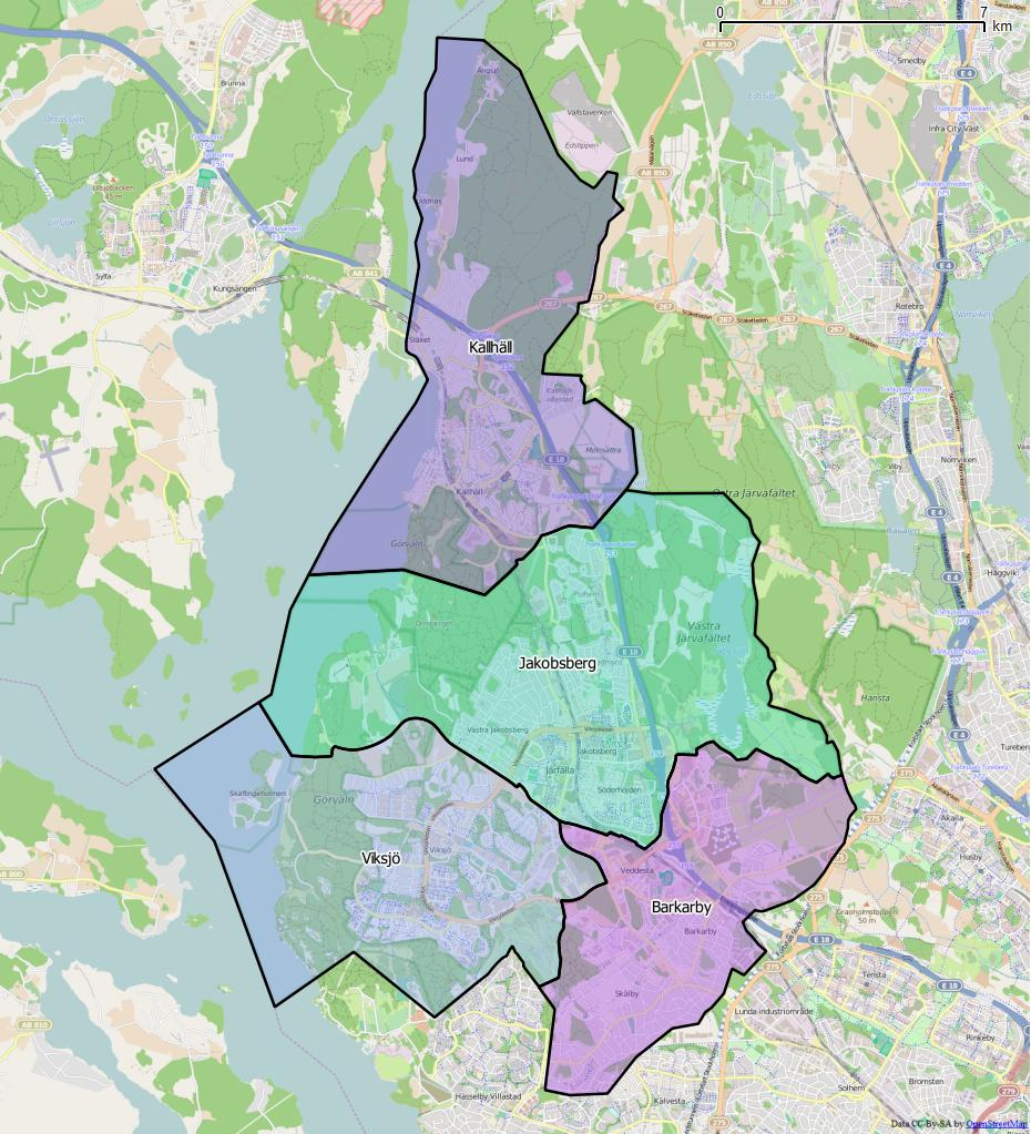 Distriktsindelningen i Järfälla kommun World file: 29.33138213660804539 0 0 -29.33138213660804539 1969855.11381702939979732 8292179.19494151789695024